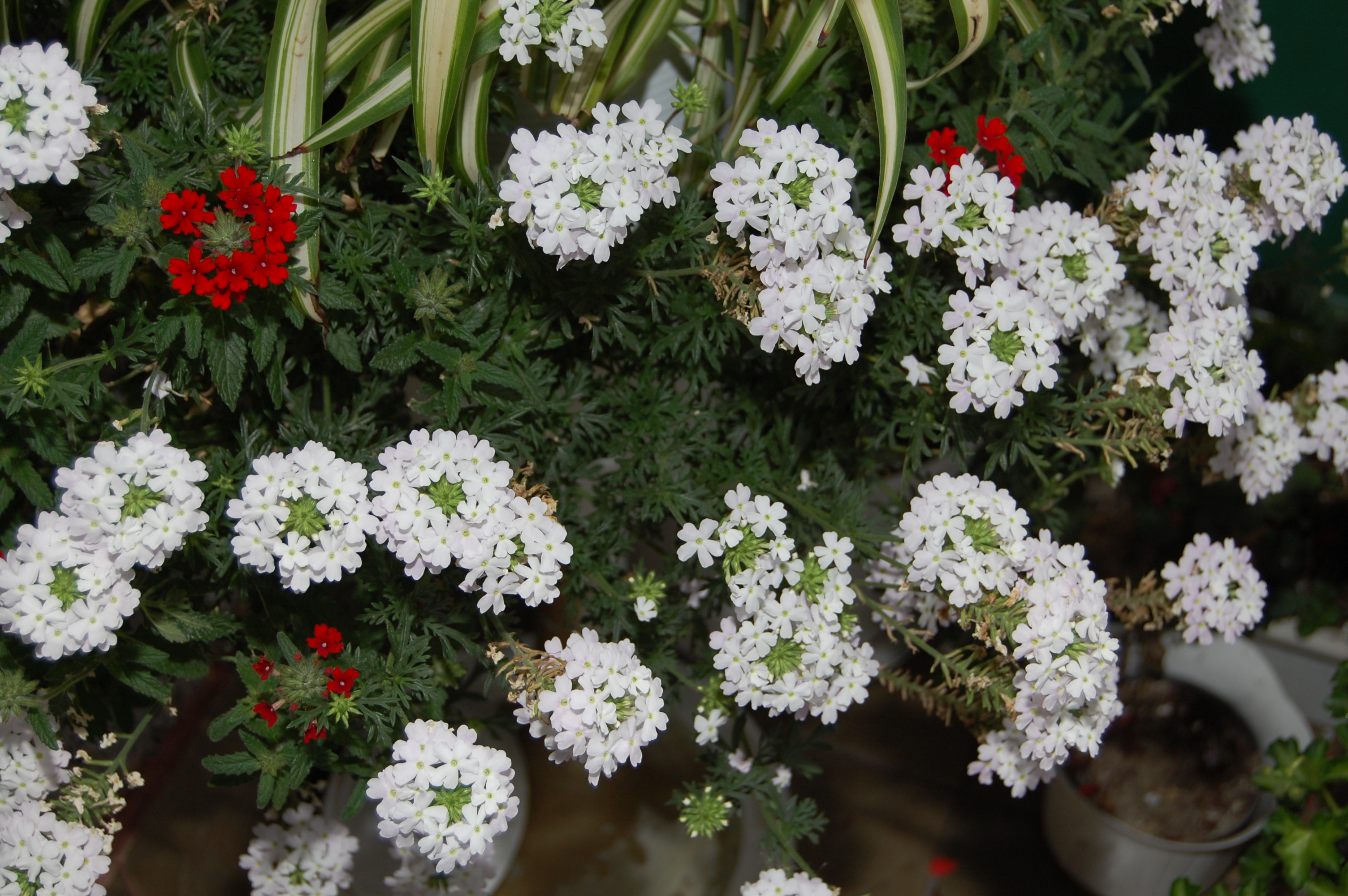 Werbena pospolita (Verbena hybrida)